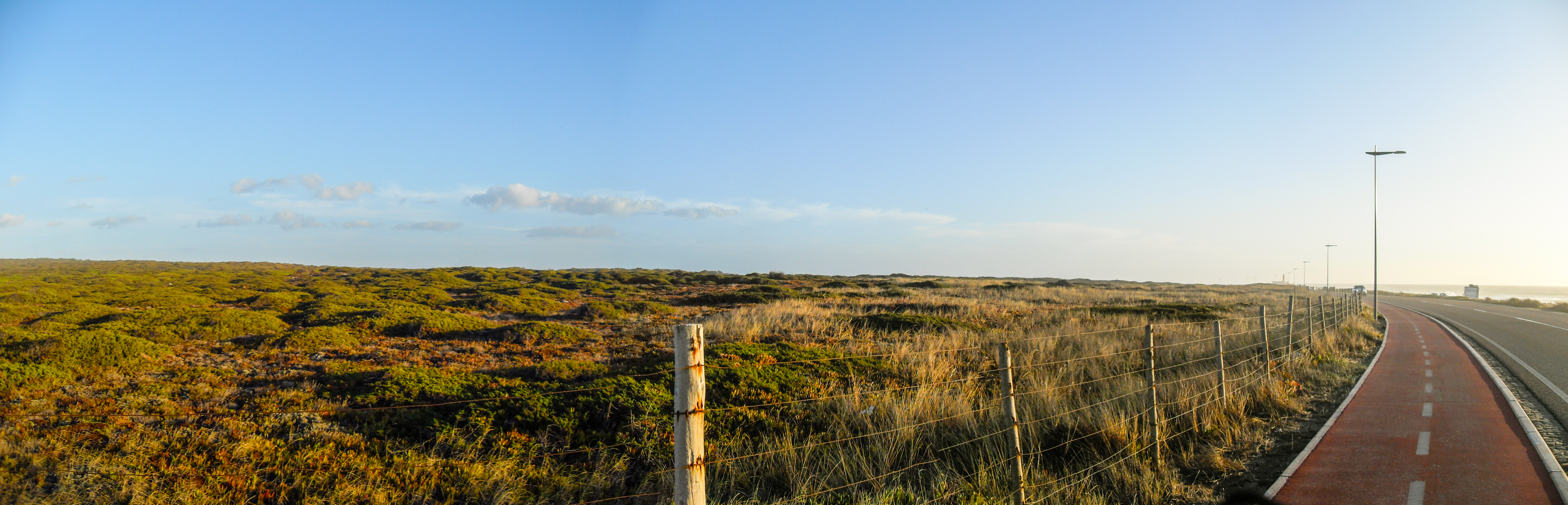 Vegetação na zona do Cabo Raso.